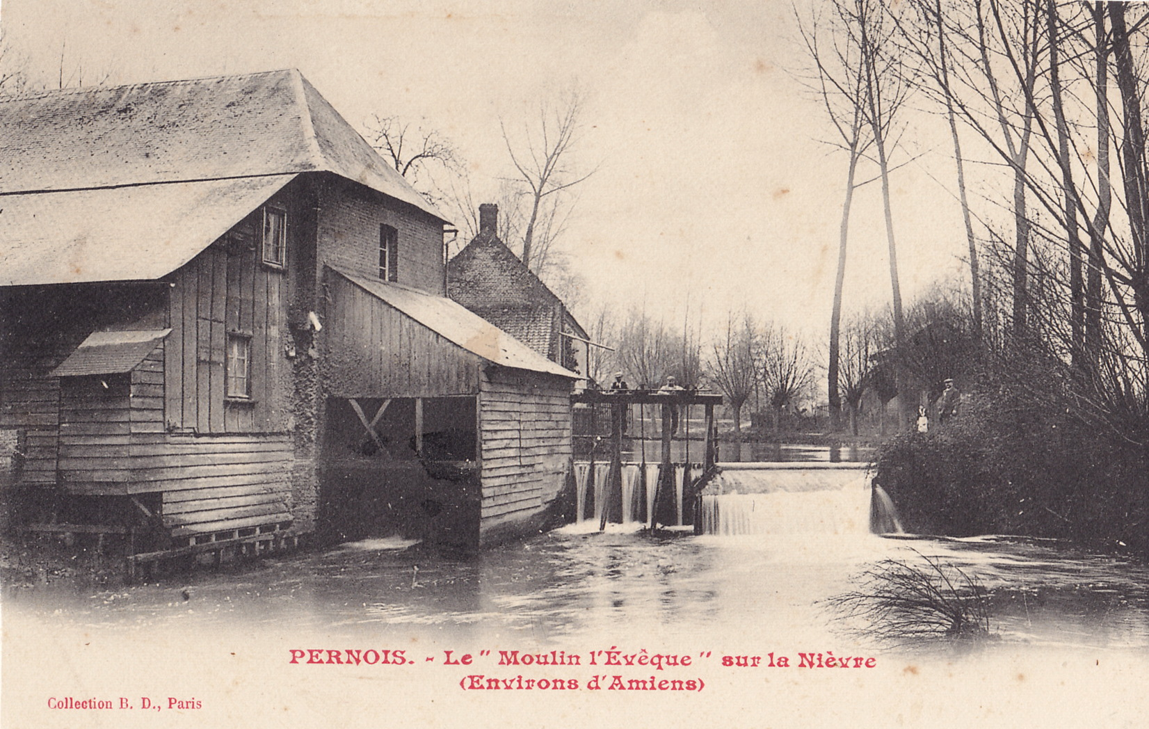 Carte postale ancienne éditée par BD à Paris :PERNOIS - Le "Moulin l'Evèque" sur la Nièvre (Environs d'Amiens)